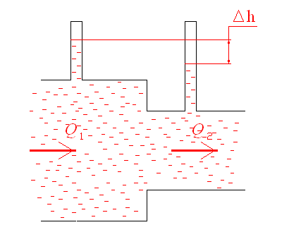 Демонстрация эффекта Вентури